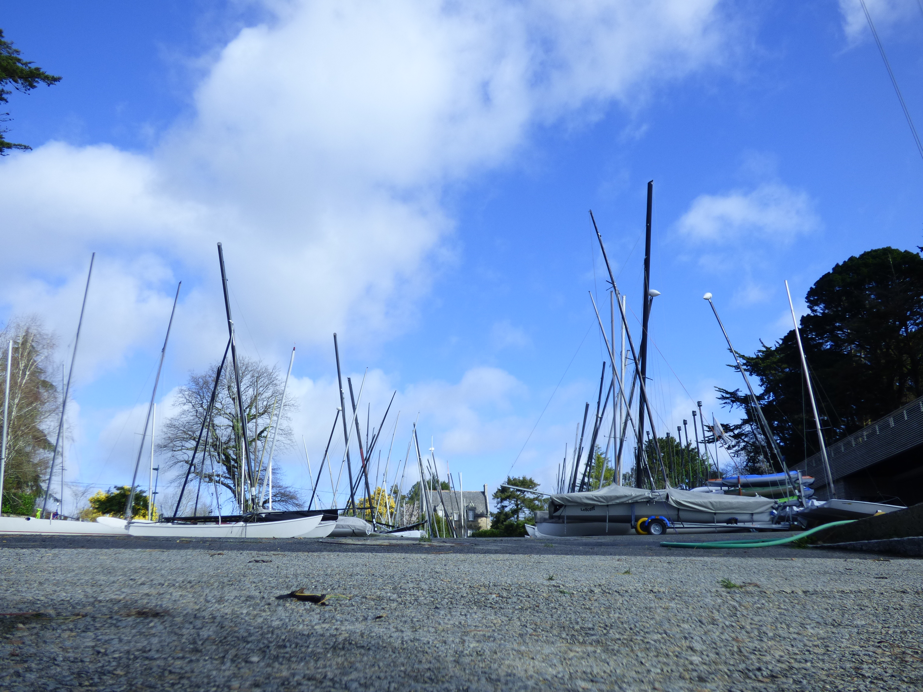 Base nautique de Arradon